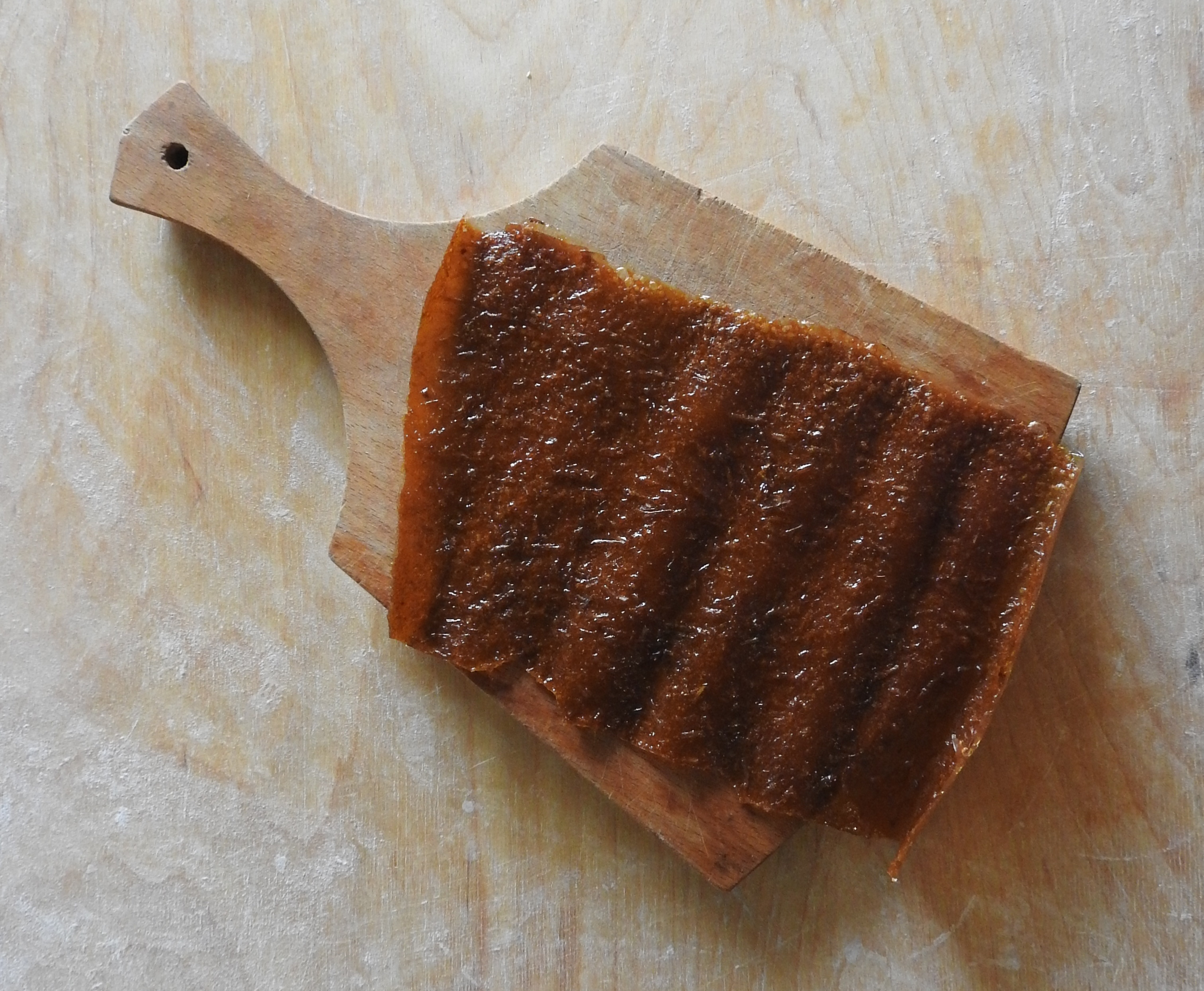 Пастила башкирская